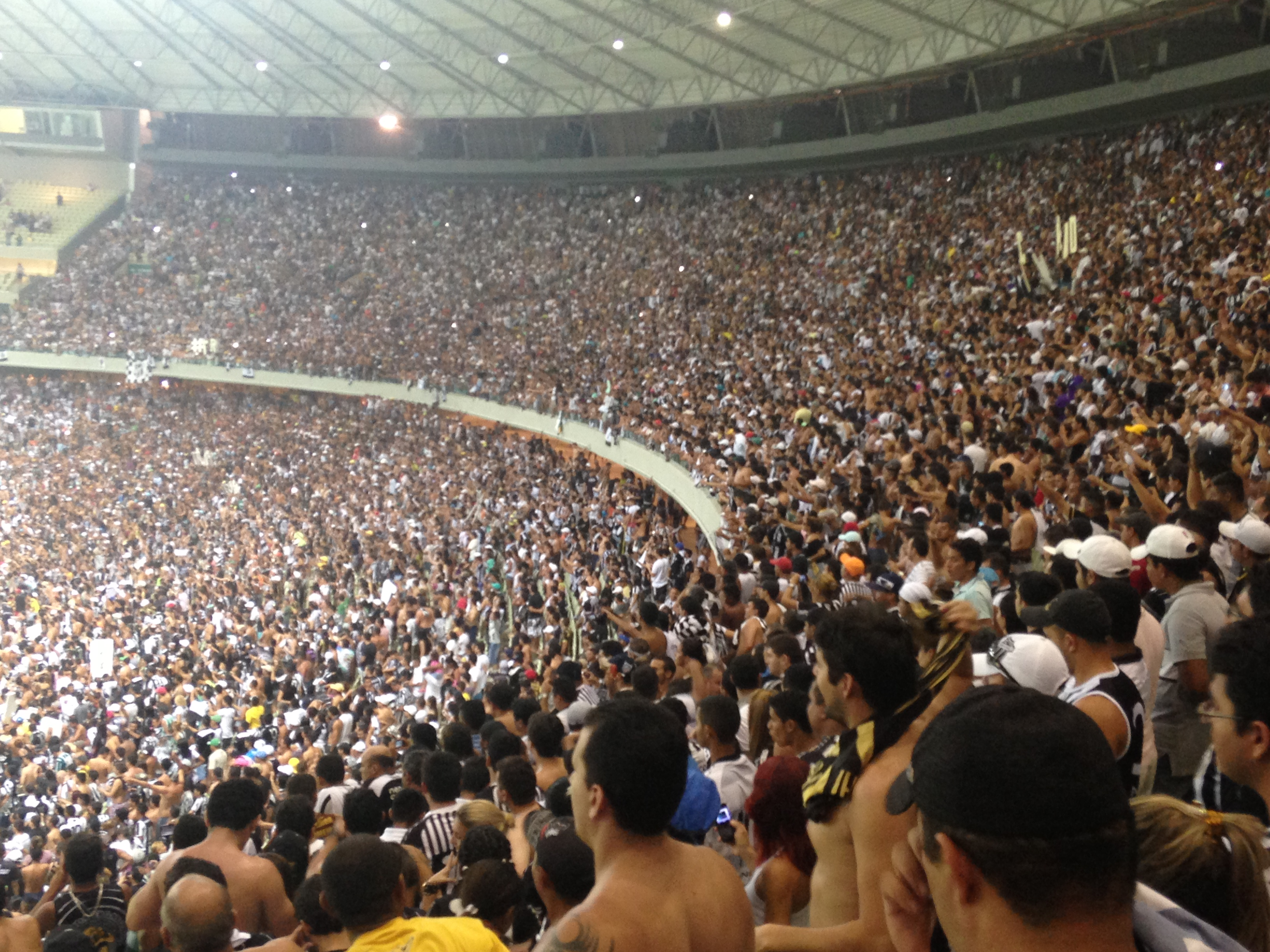 Torcida do Ceará Sporting Club na final do Campeonato Cearense 2013